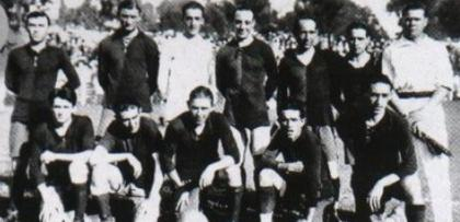 Equipo de Newell´s campeón de la Copa Estimulo de 1925